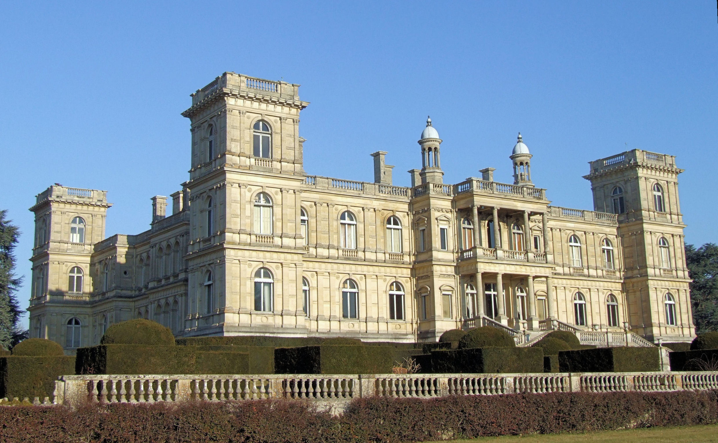 Ferrières-en-Brie - Château de Ferrières - Vue d'ensemble